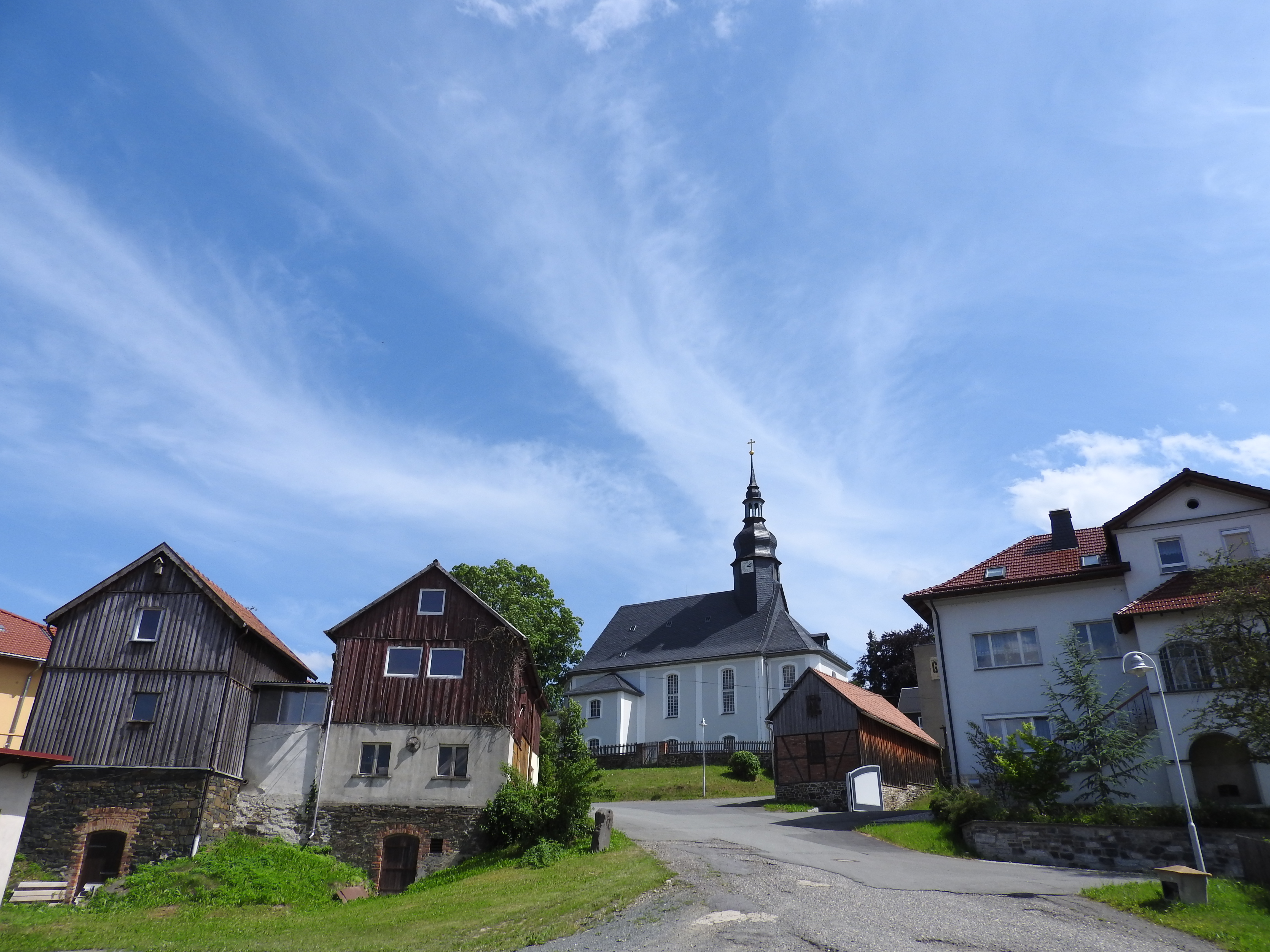 Crispendorf, Thüringen